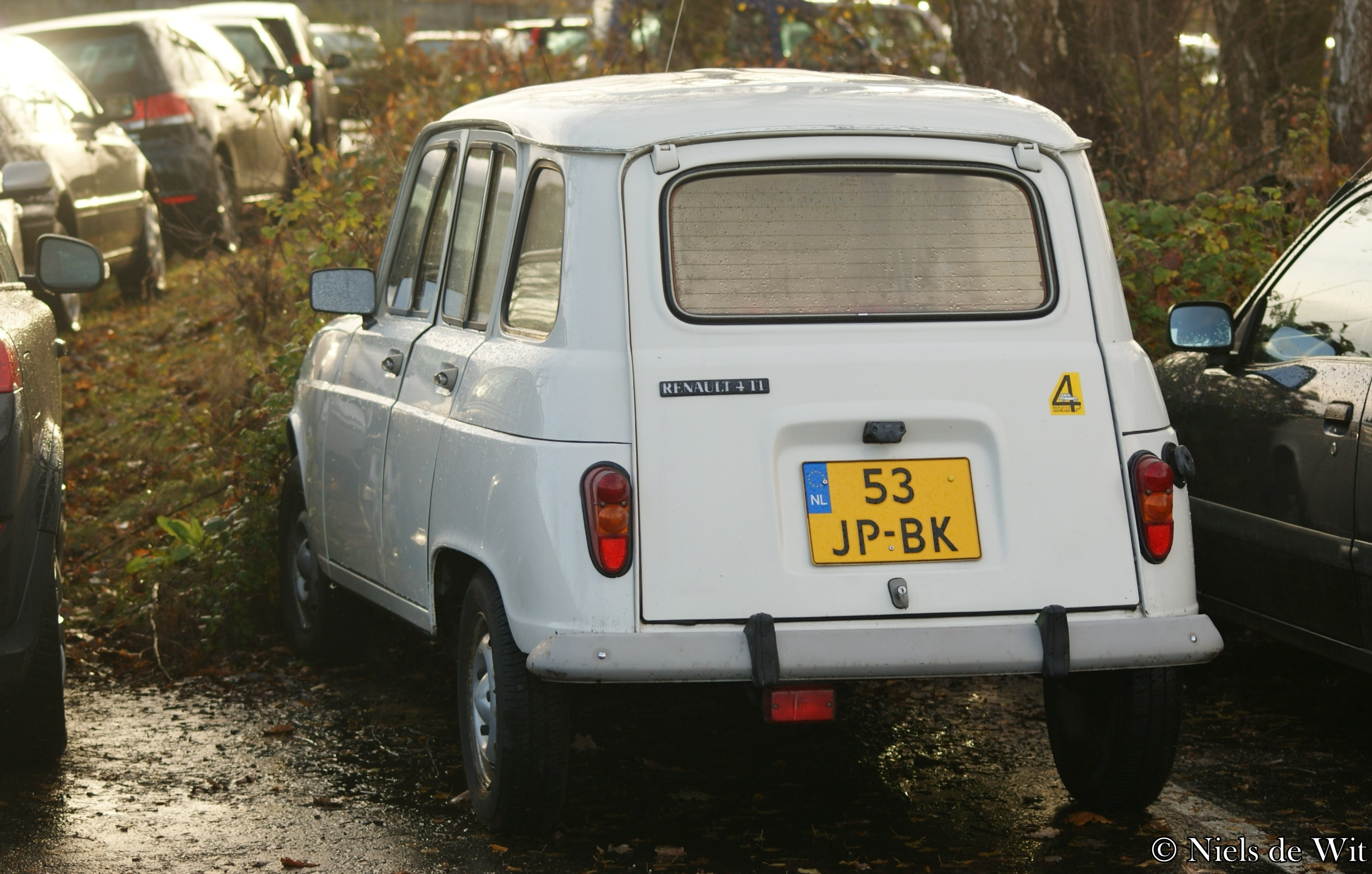 53-JP-BK